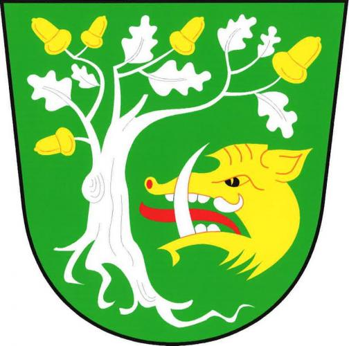 znak, Háje, okres Příbram